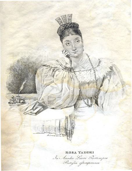 Frontispiece, Rosa Taddei, Improvvisi di Rosa Taddei in Arcadia Licori Partenopea: cantati in varie accademie in Venezia nel carnovale del 1832 (Venezia: Presso Gio. Gallo sotto le procurative vecchie, 1832).